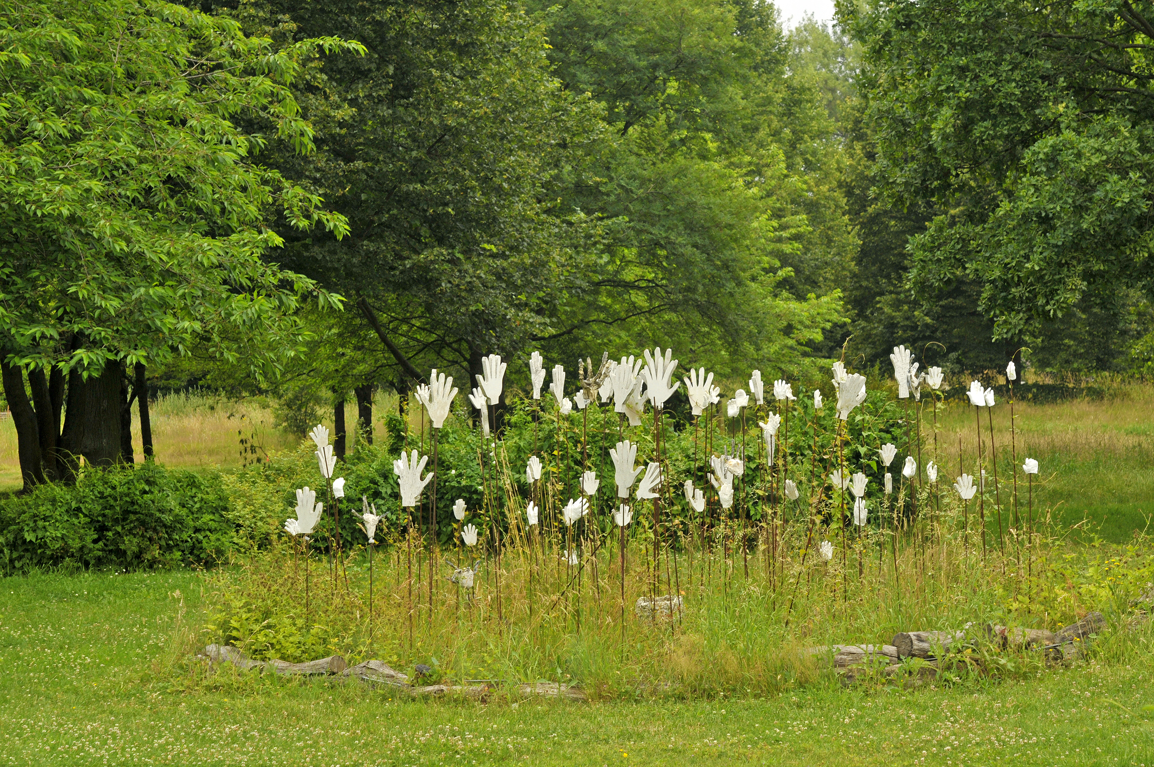 Der Hiroshima-Hain in Hannover wurde 1987 auf dem Gelände der früheren Pferderennbahn Alte Bult an der Eilenriede im Stadtteil Südstadt-Bult angelegt. Die 110 gepflanzten Kirschbäume erinnern an die 110.000 Soforttoten während des Atombombenabwurfs über Hiroshima am 6. August 1945. Am Eingang zu dem Hiroshima-Hain liegt ein aus zersägten Baumstämmen gelegter kreisrunder Ouroboros, aus dem die Hände der Eingeschlossenen flehend zum Himmel gestreckt sind, in halber Höhe die kleinen Kinderhände und darüber die großen Erwachsenenhände. Klaus-Dieter Kappenberg gestaltete diese Installation im Jahr 2000 zusammen mit Gästen aus verschiedenen Partnerstädten von Hannover. Die angeschmorten und teilweise verkohlten Holzstämme entnahm er aus der Asche vom Osterfeuer. Der Künstler Klaus-Dieter Kappenberg gibt dieser Vision des Untergangs von Hiroshima eine gänzlich neue Deutung. In den aus Baumscheiben gelegten kreisrunden Ouroboros legt er weitere Baumstämme hinein, so dass sich der Ouroboros beim Blick von oben in das CND-Symbol der atomaren Abrüstung verwandelt. Dadurch werden die ausgestreckten Hände zu erwartungsvollen Händen von Demonstranten, die hoffnungsvoll der atomaren Abrüstung entgegengehen. Dieser Eindruck wird noch dadurch verstärkt, dass in der Kreismitte ein Modell des Genbaku Domes steht. Der Genbaku Domes wurde bei dem Atombombenangriff auf Hiroshima nur teilweise zerstört und steht als Friedensdenkmal im Friedenspark Hiroshima. Im Dezember 1996 erklärte die UNESCO dieses Friedensdenkmal zum Weltkulturerbe mit der Begründung, dass es nicht nur ein starkes Symbol der zerstörerischsten Kraft sei, die je von der Menschheit geschaffen wurde, es drücke zudem die Hoffnung auf Weltfrieden und auf die endgültige Beseitigung aller Kernwaffen aus.